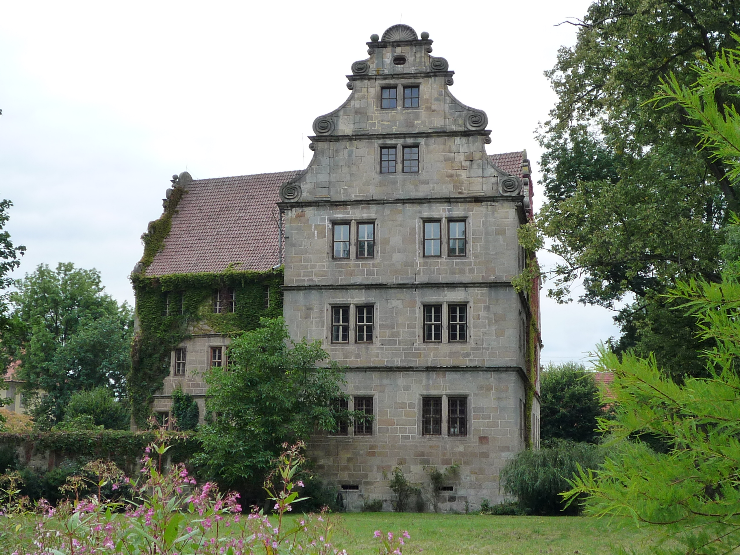 Seitenansicht des Schlosses Friesenhausen